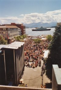 Photo prise lors du festival de jazz de Molde avec une vue de la Rådhusplassen